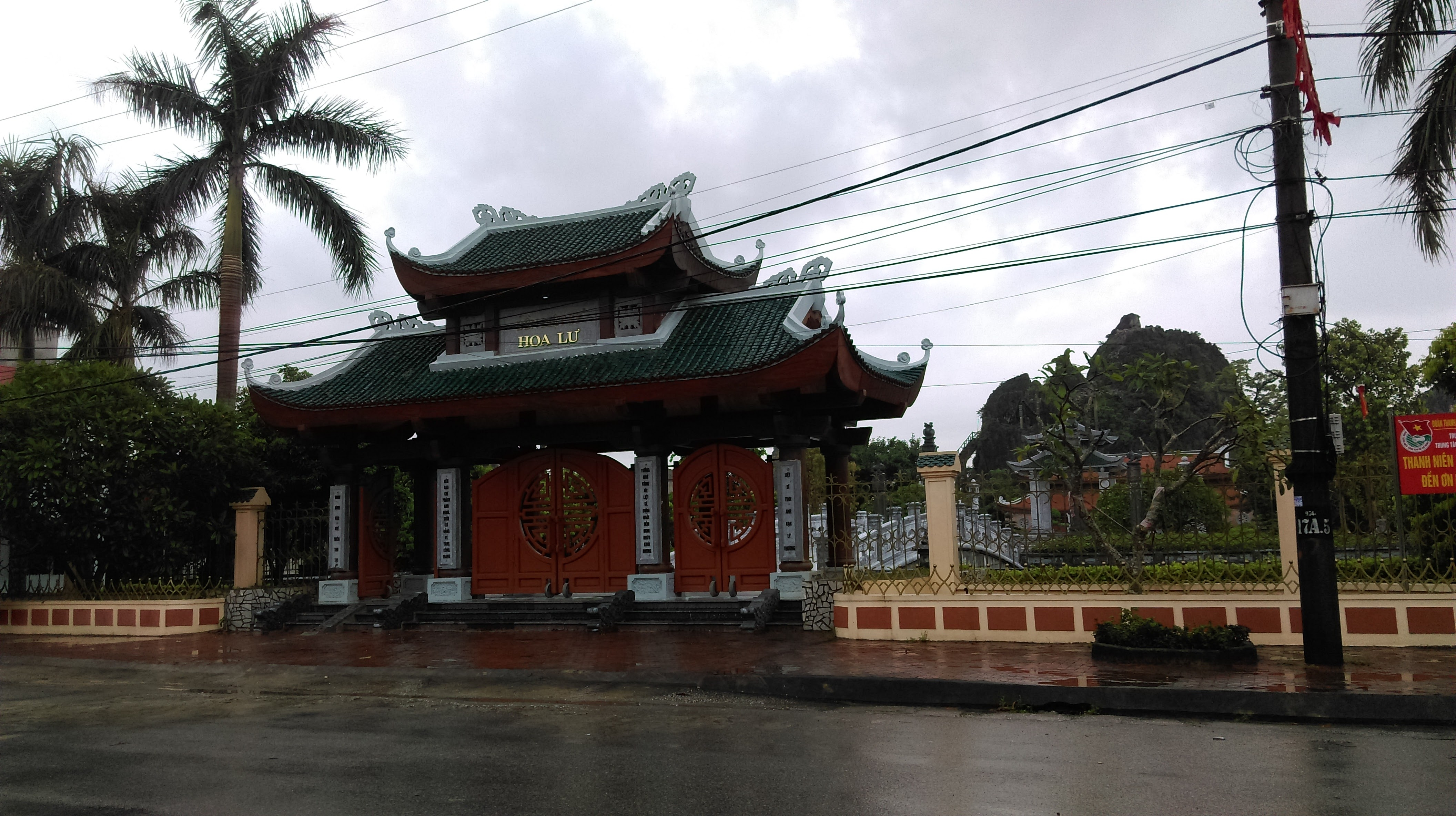 Đền Liệt sĩ Hoa Lư, Ninh Bình